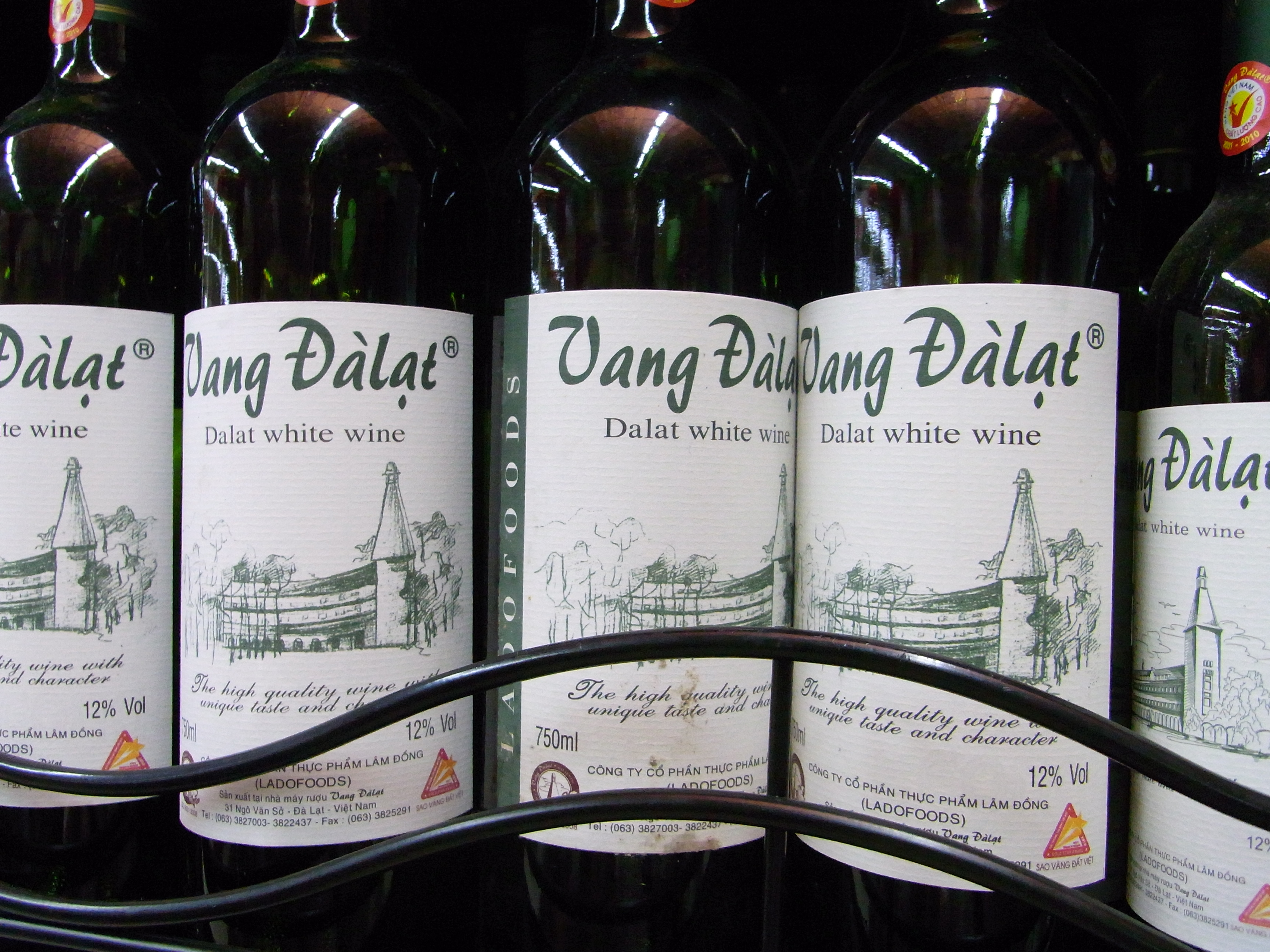 Dalat wine